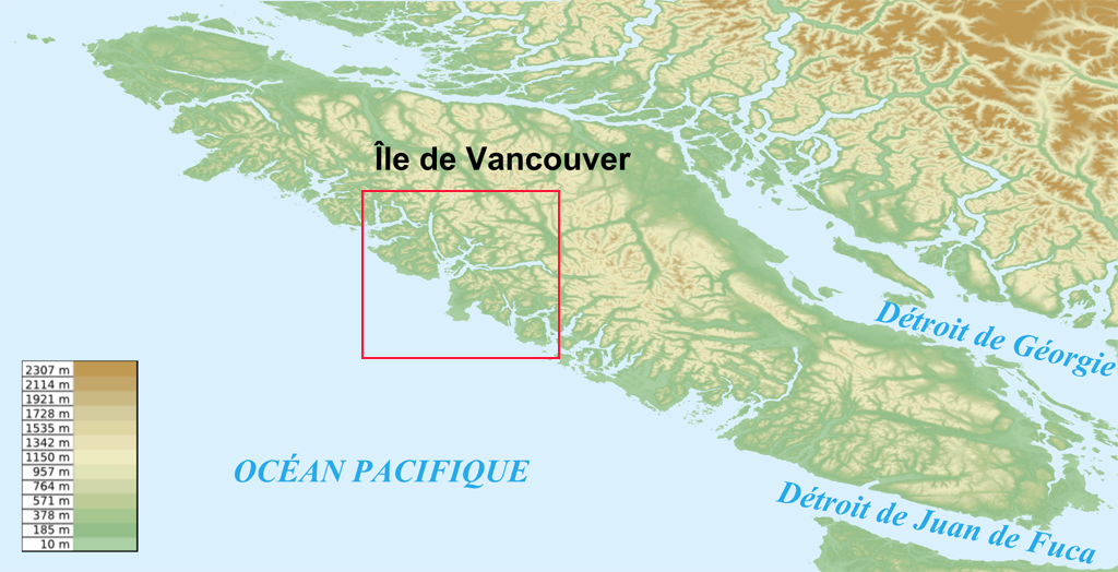 Sujet : Localisation de la baie et de l'île Nootka sur une carte de l'île de Vancouver Fond de carte : carte existante Logiciels de dessin utilisés : . Inkspace pour l'écriture du texte des légendes Format : PNG